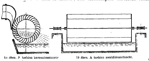 Bánki saját rajza az általa feltalált vízturbináról.